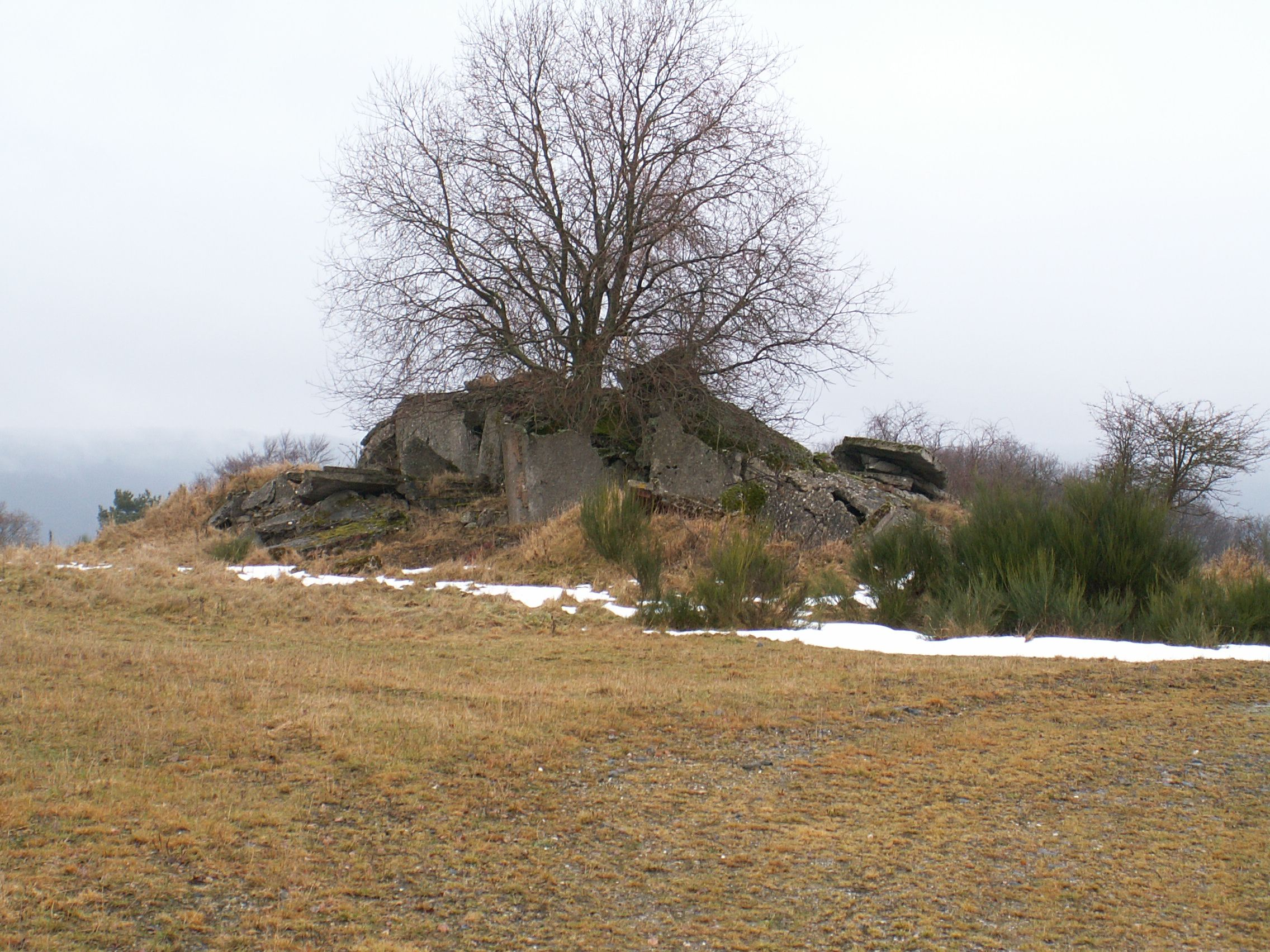 gesprengter Bunker auf der Dreiborner Hochfläche auf dem Truppenübungsplatz Vogelsang im Nationalprk Eifel.